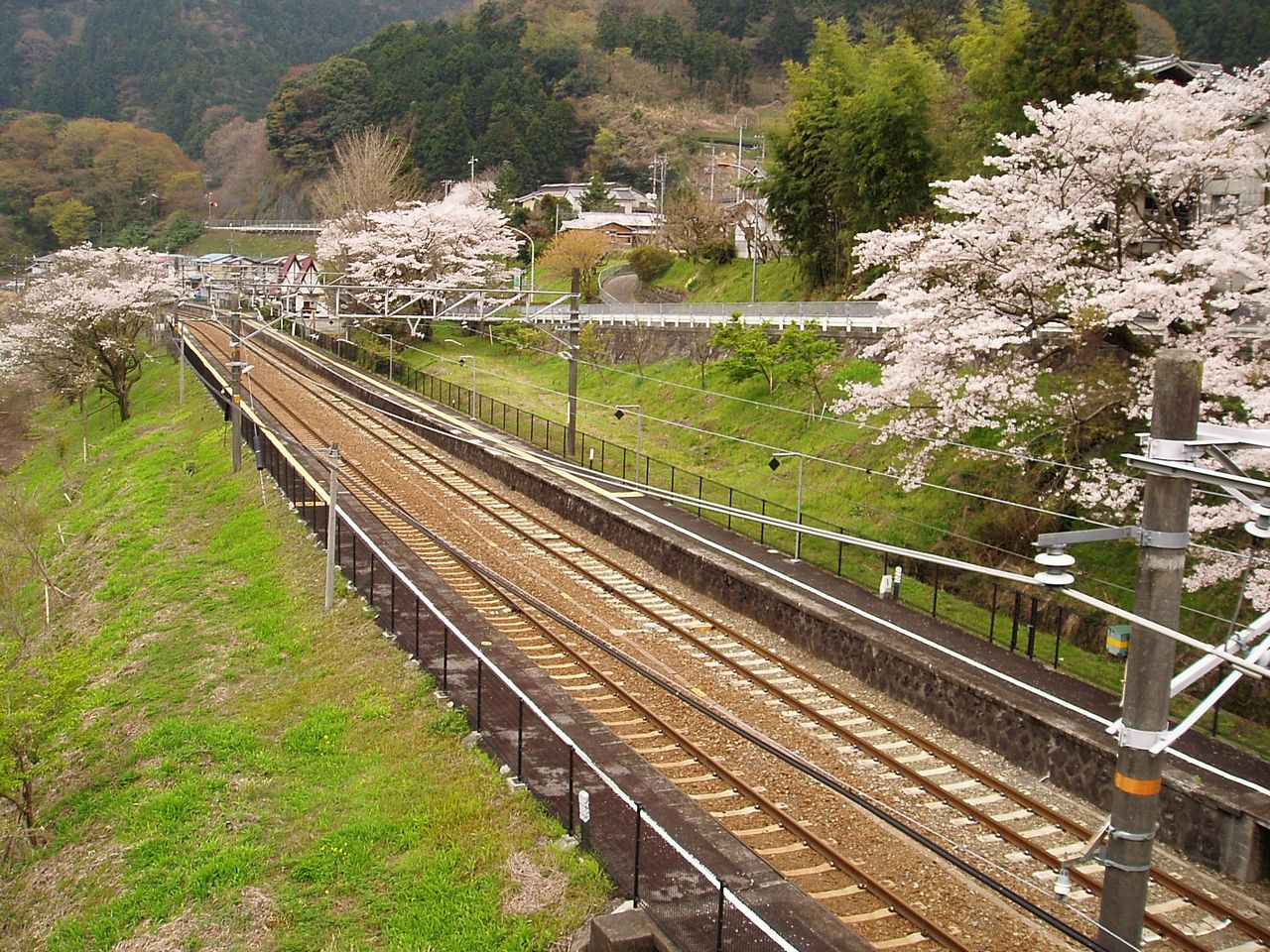 Central Japan Railway Company, Yaga Sta.